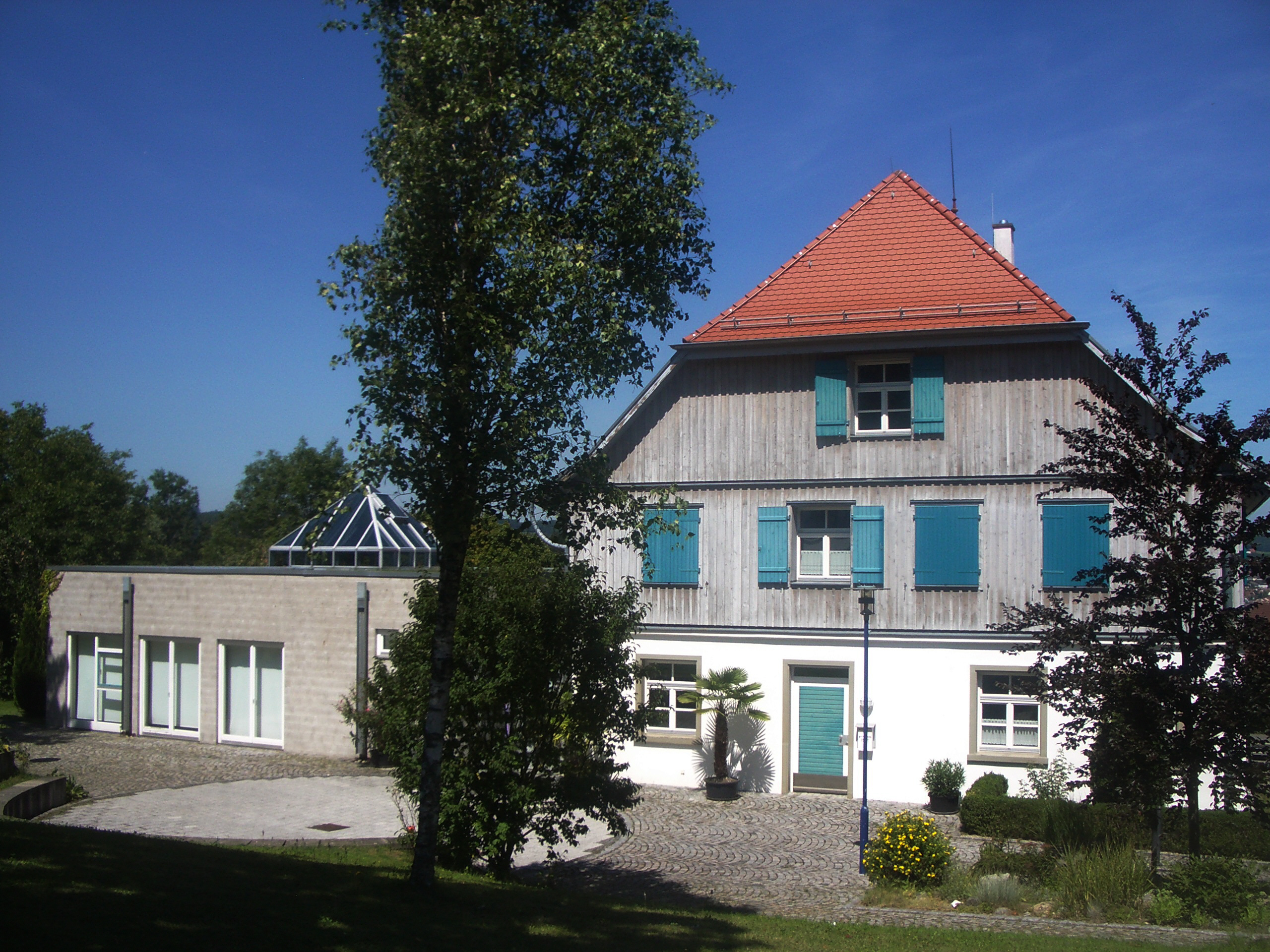 Evangelisches Gemeindezentrum, Bergstraße, D-88276 Berg